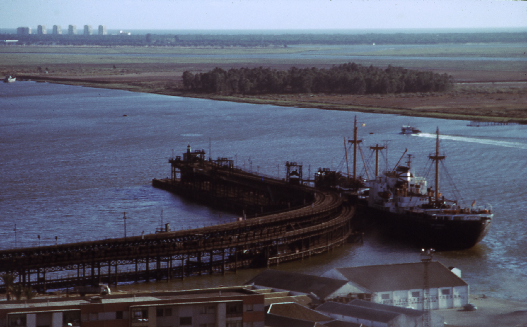 Muelle de mineral de la compañía Riotinto